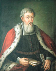 Hieronim Wołłowicz